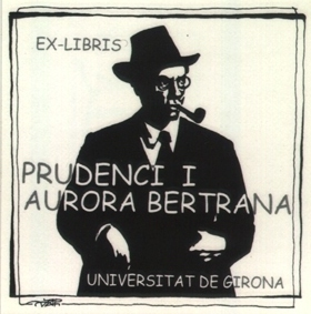 Exlibris del Fons Bertrana de la Universitat de Girona